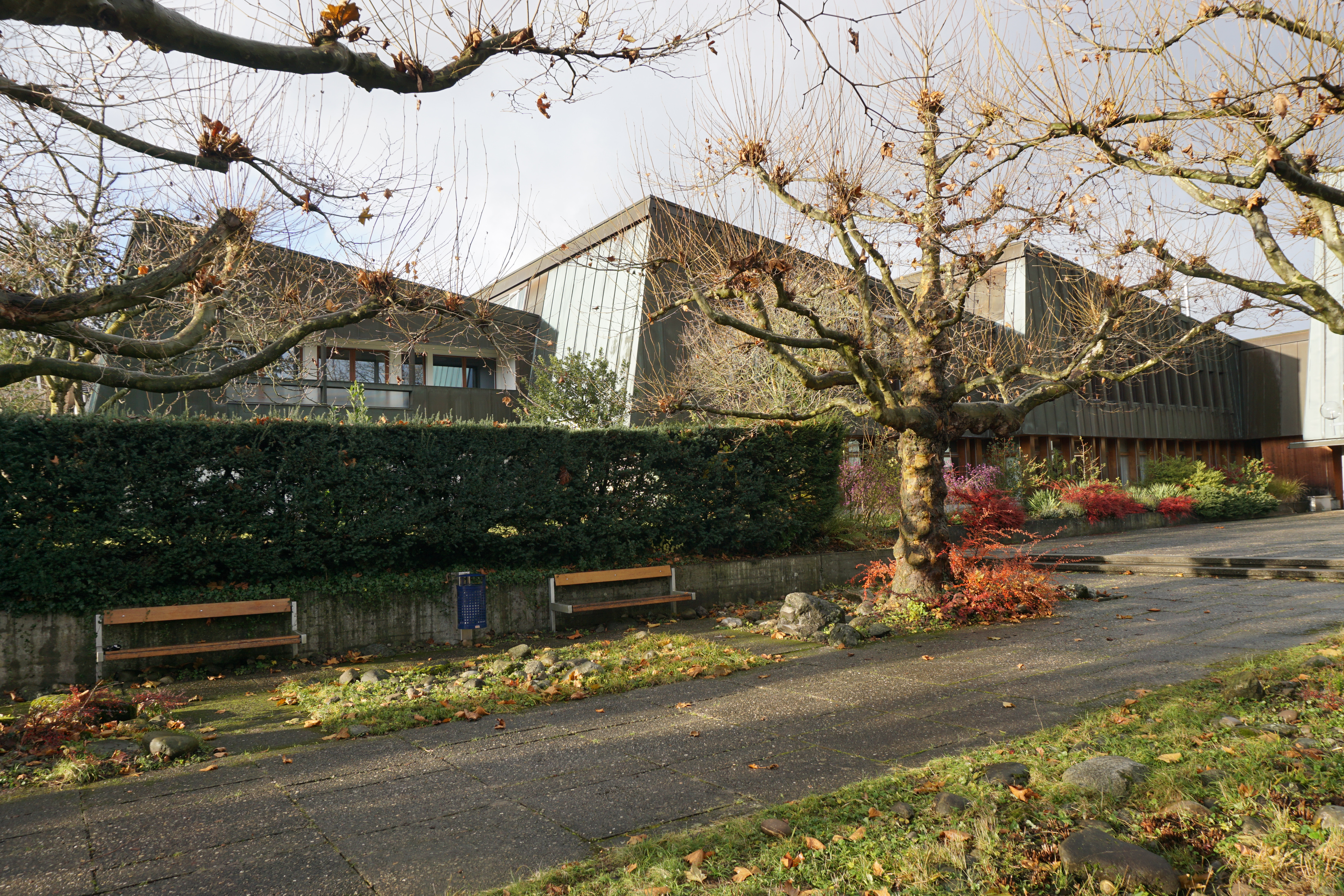 Pfarrhaus links und Gemeinderäume von Süden